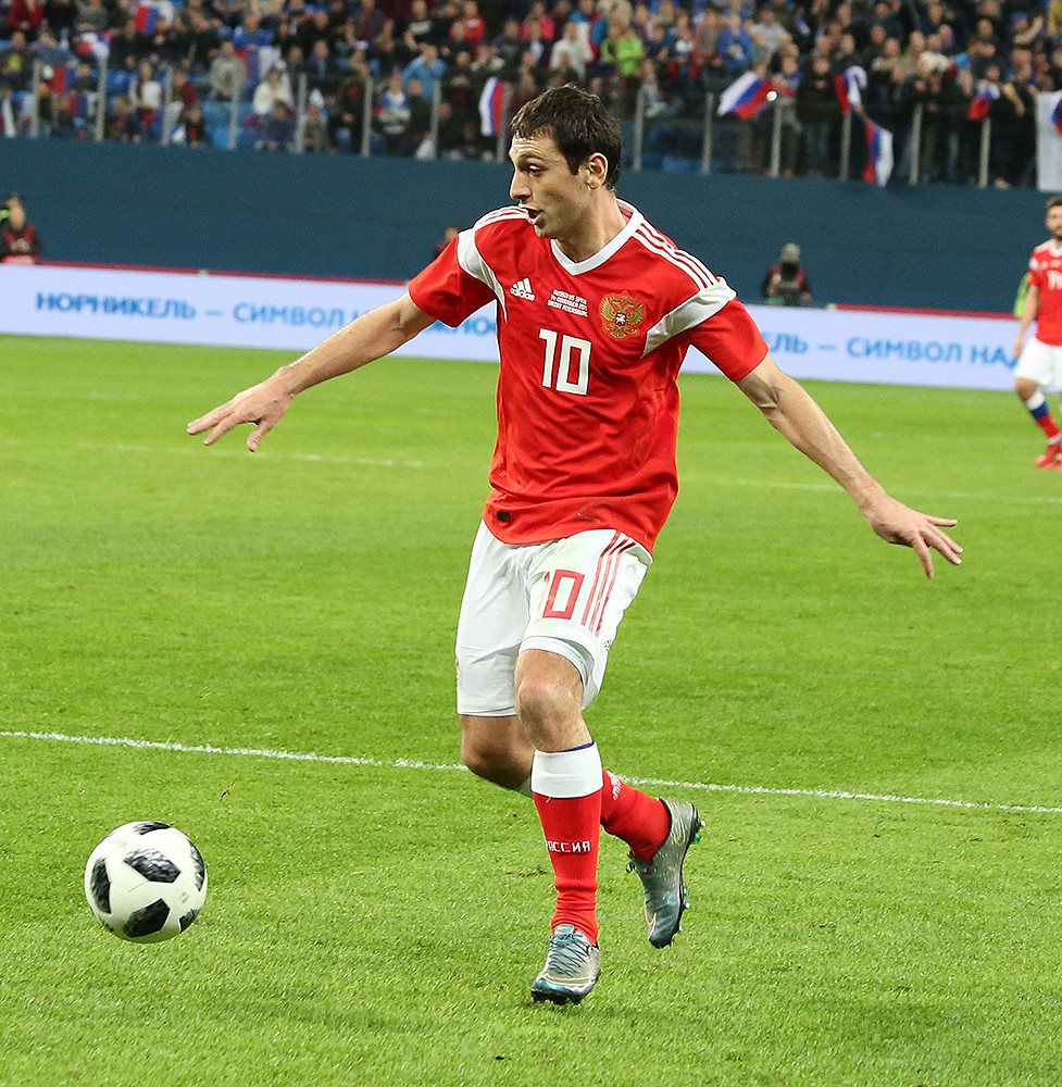 Alan Dzagoev